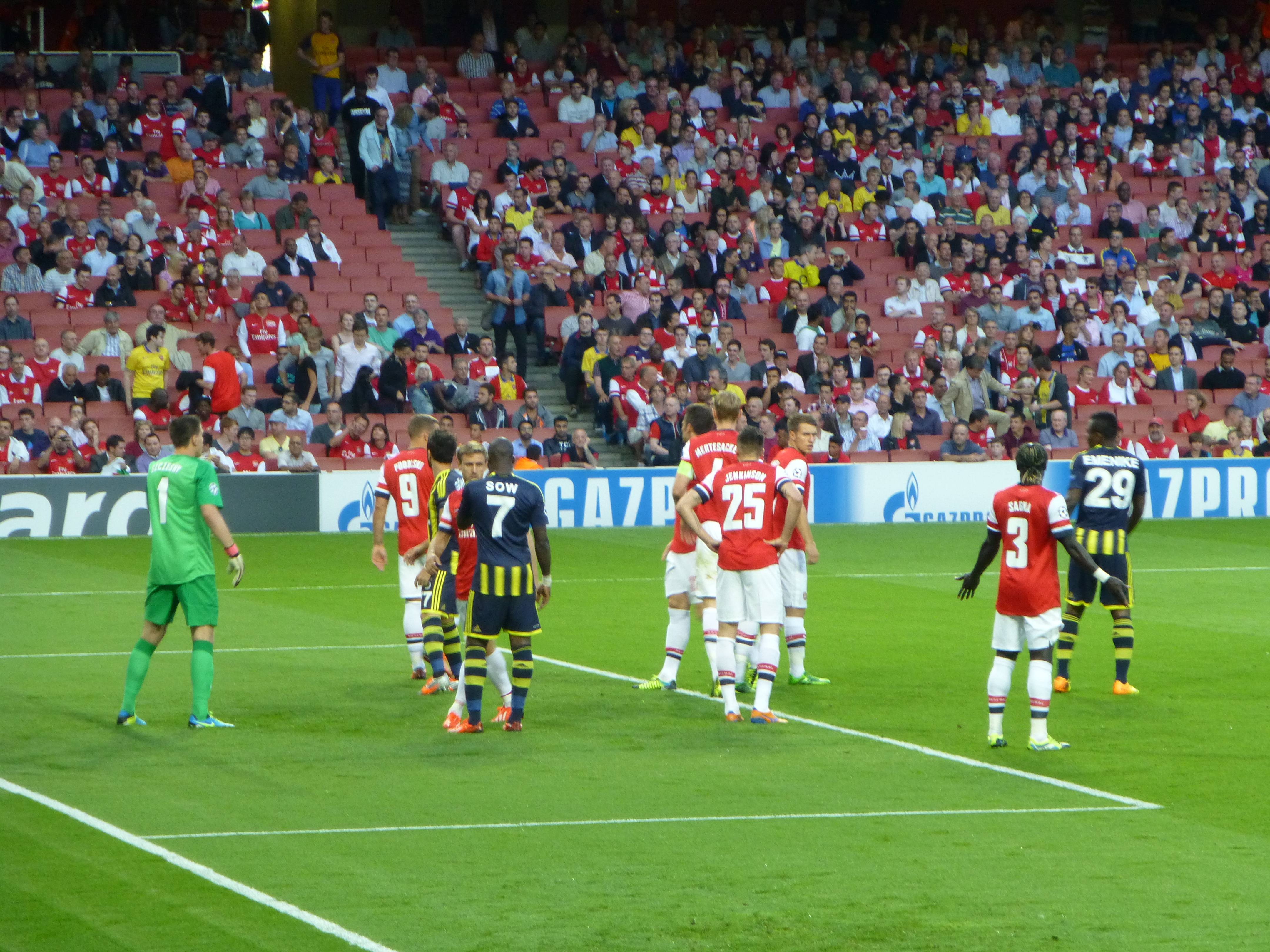 Arsenal vs Fenerbahce